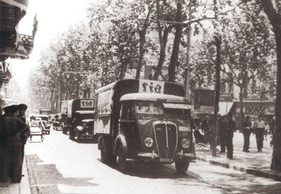 Convoir de la SIA France - 1938